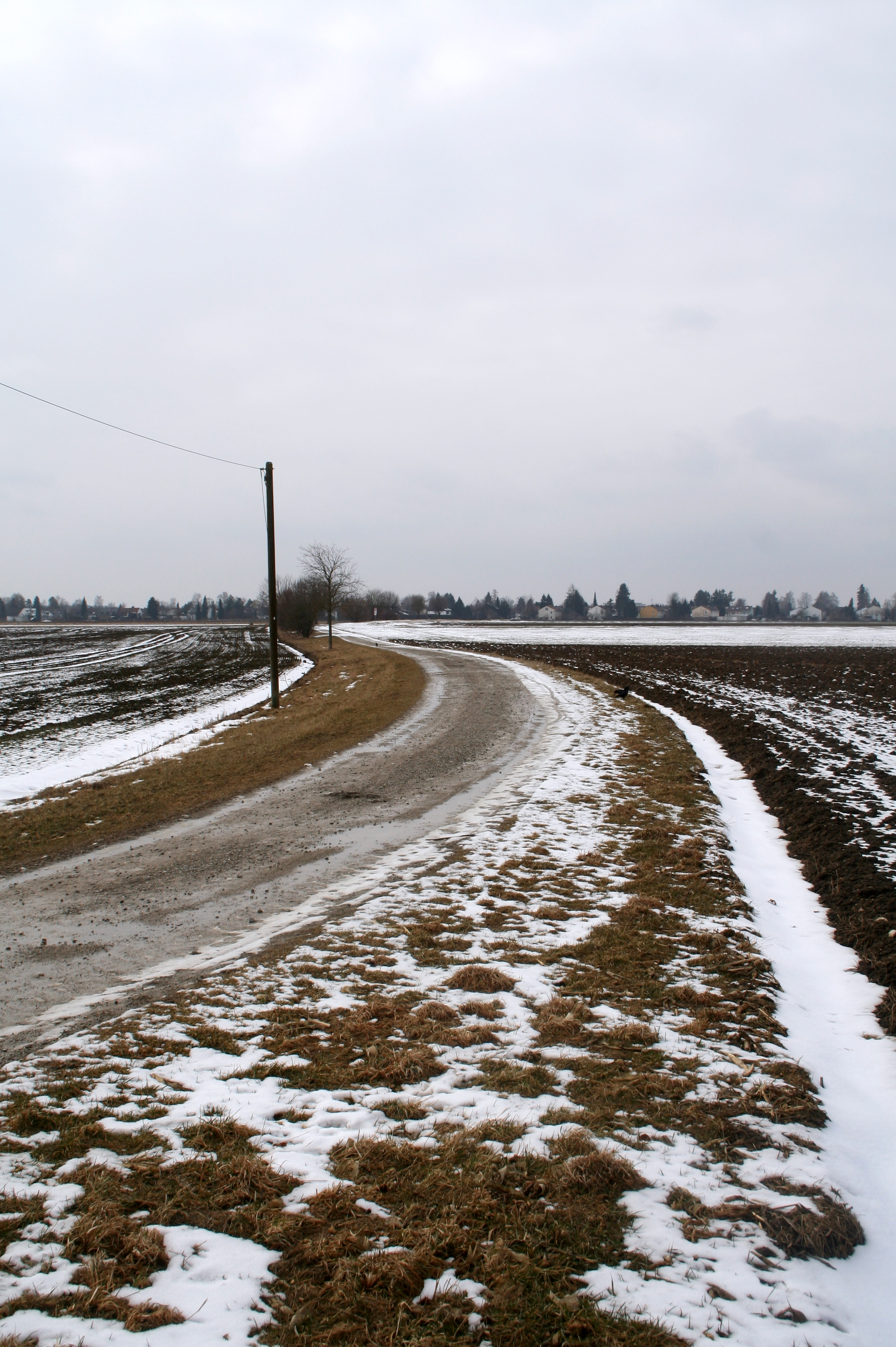 Römerstraße Via Julia bei Buchendorf